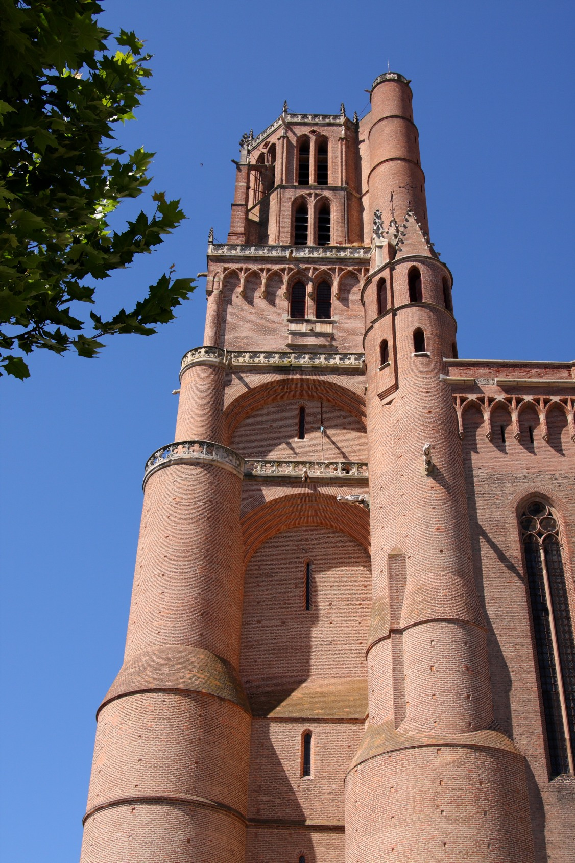 Le clocher de la cathédrale Sainte Cécile à Albi